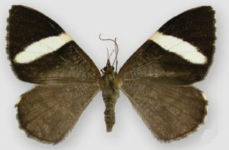 Hagnagora elianne